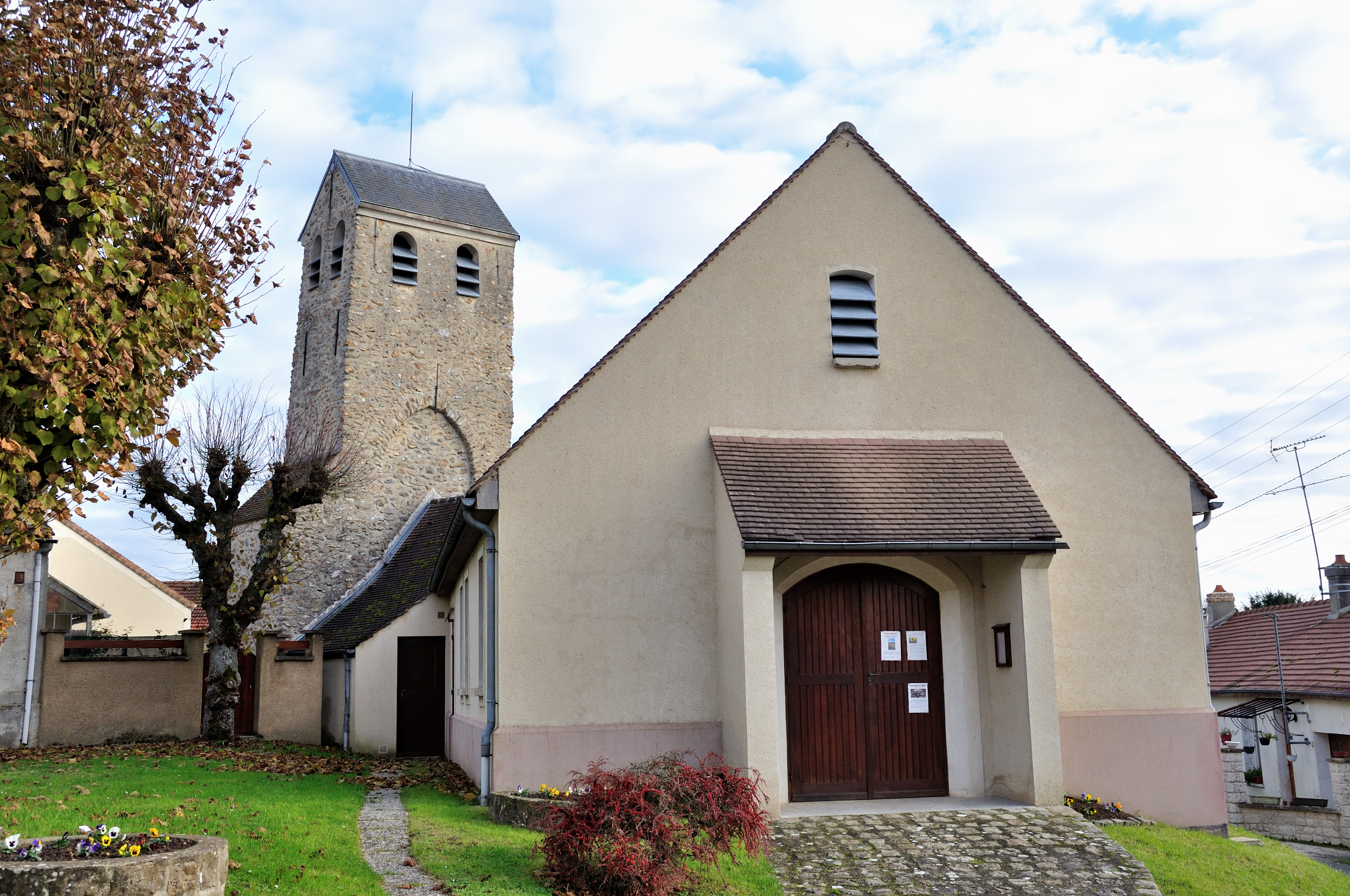 Église Saint-Sulpice de Chauffry. (département de la Seine-et-Marne, région Île-de-France).